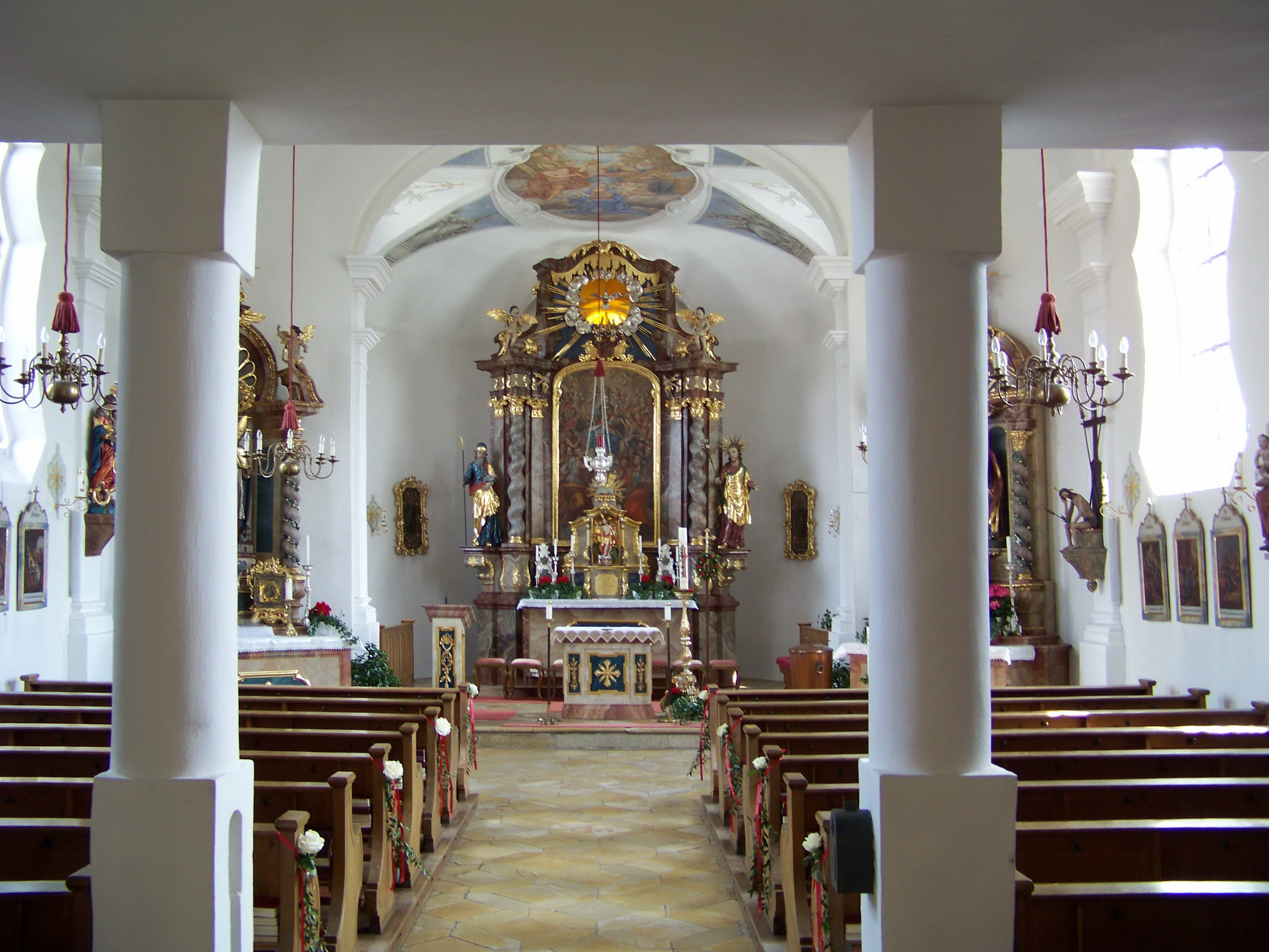 Ergoldsbach, Kläham, Kirchplatz 1. Filialkirche Mariä Heimsuchung und Kapelle. Saalkirche mit eingezogenem Chor und Westturm, Gliederung durch Lisenen und Putzbänderung. Langhaus und Chor mit Flachtonne. Hochaltar mit Rokokoaufbau; Seitenaltäre barock.